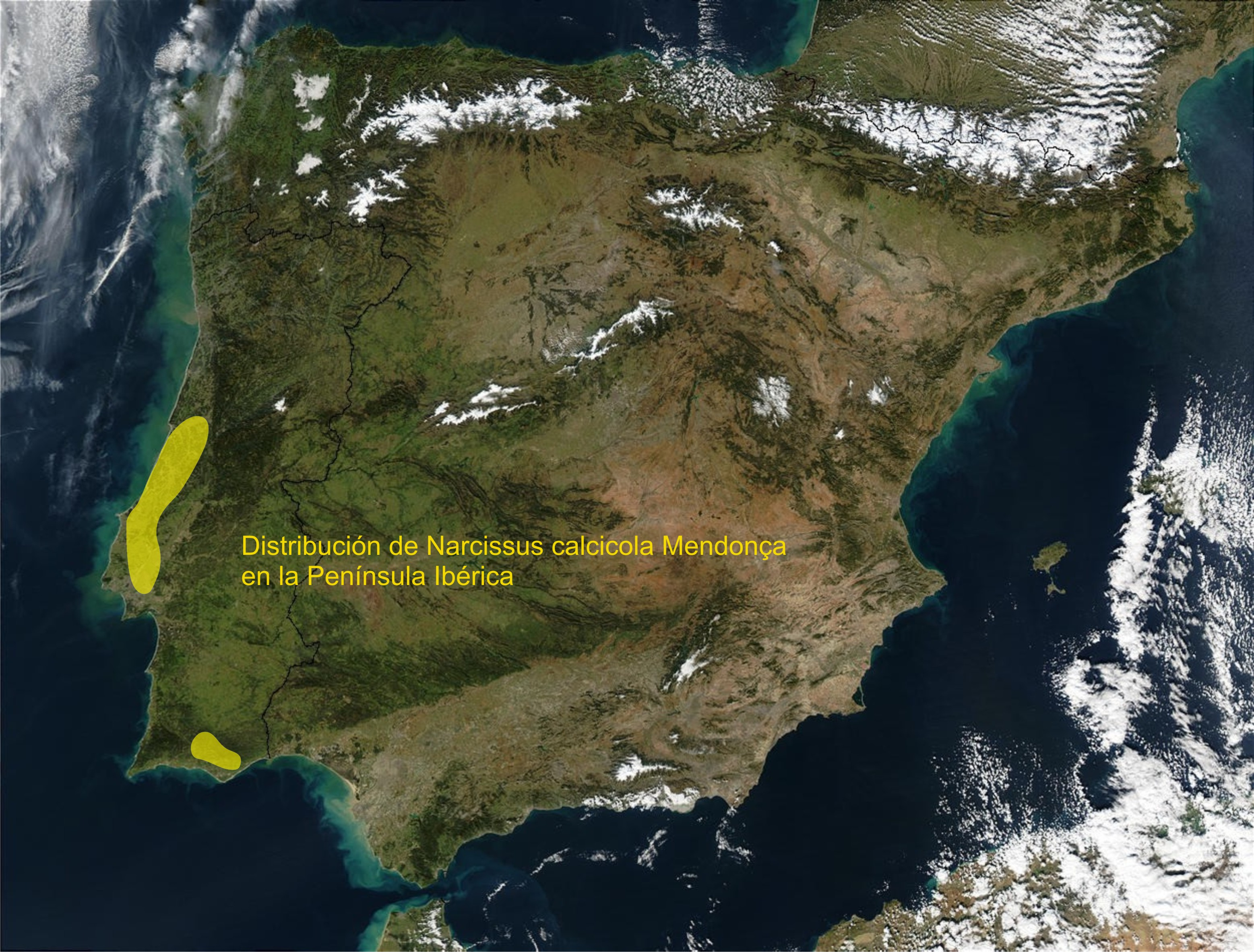 Área de distribución de Narcissus calcicola Mendonça en la Península Ibérica